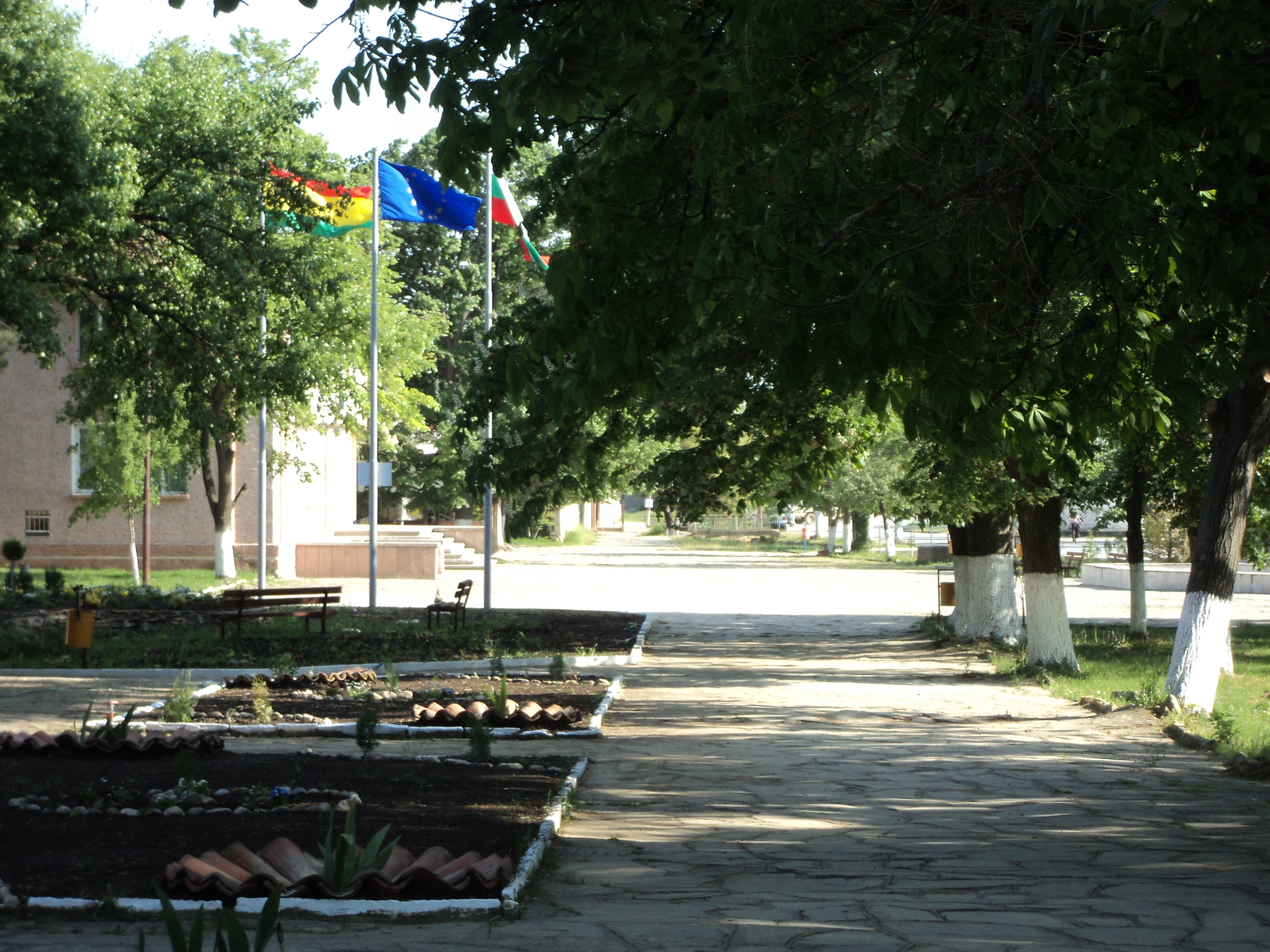 Парк - Драгоданово